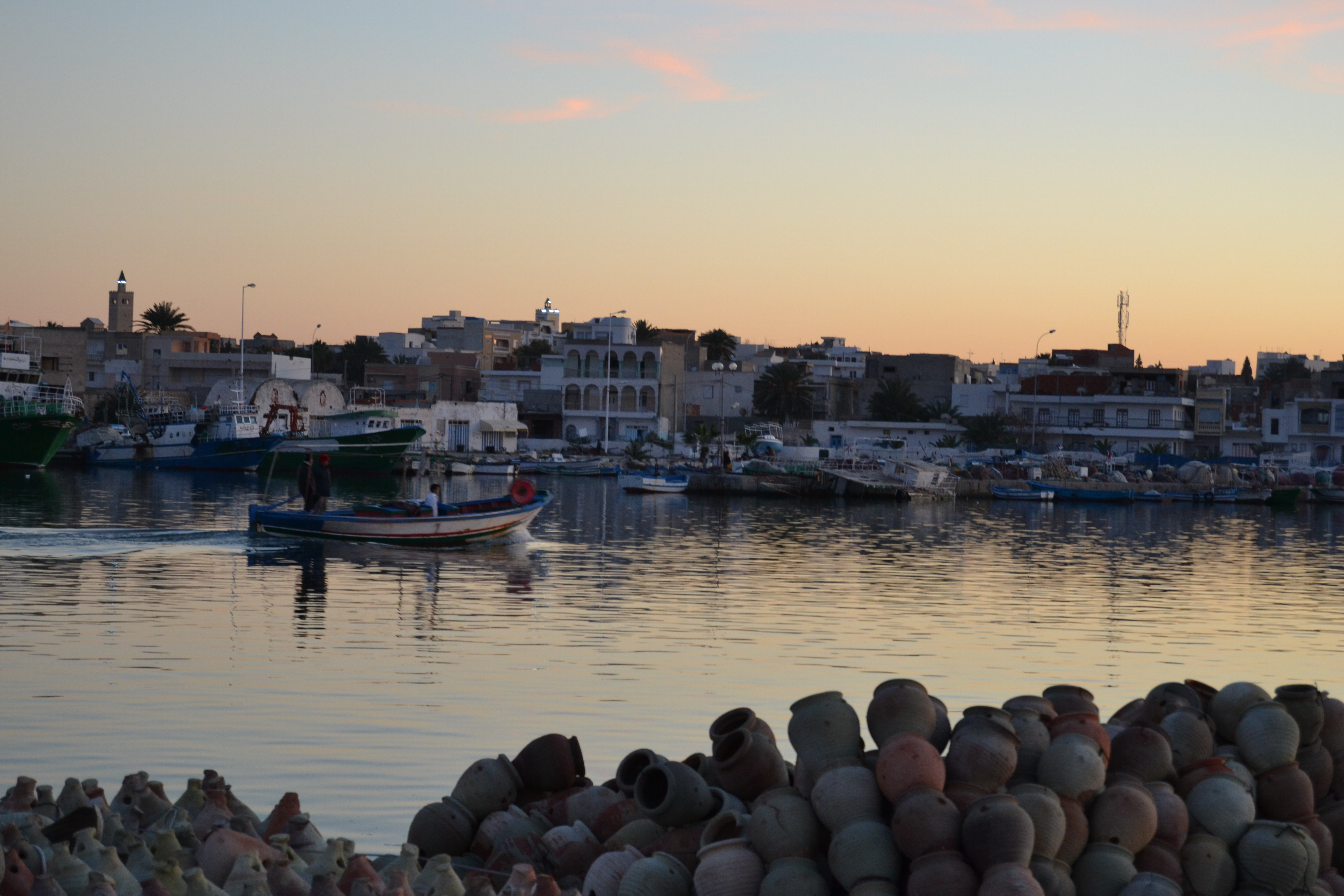 Vue sur le port de pêche de Sayada This photograph was taken with a Nikon D3100